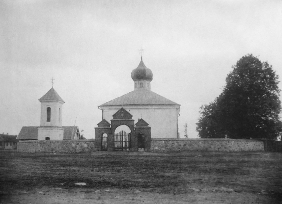 Беларуская (тарашкевіца): Лужкі (Łužki), пляц Рынак (plac Rynak). Царква Раства Багародзіцы